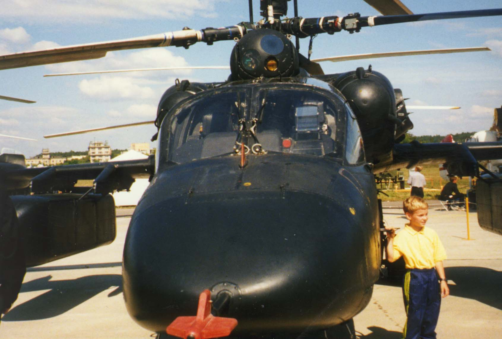 Kamov Ka-52